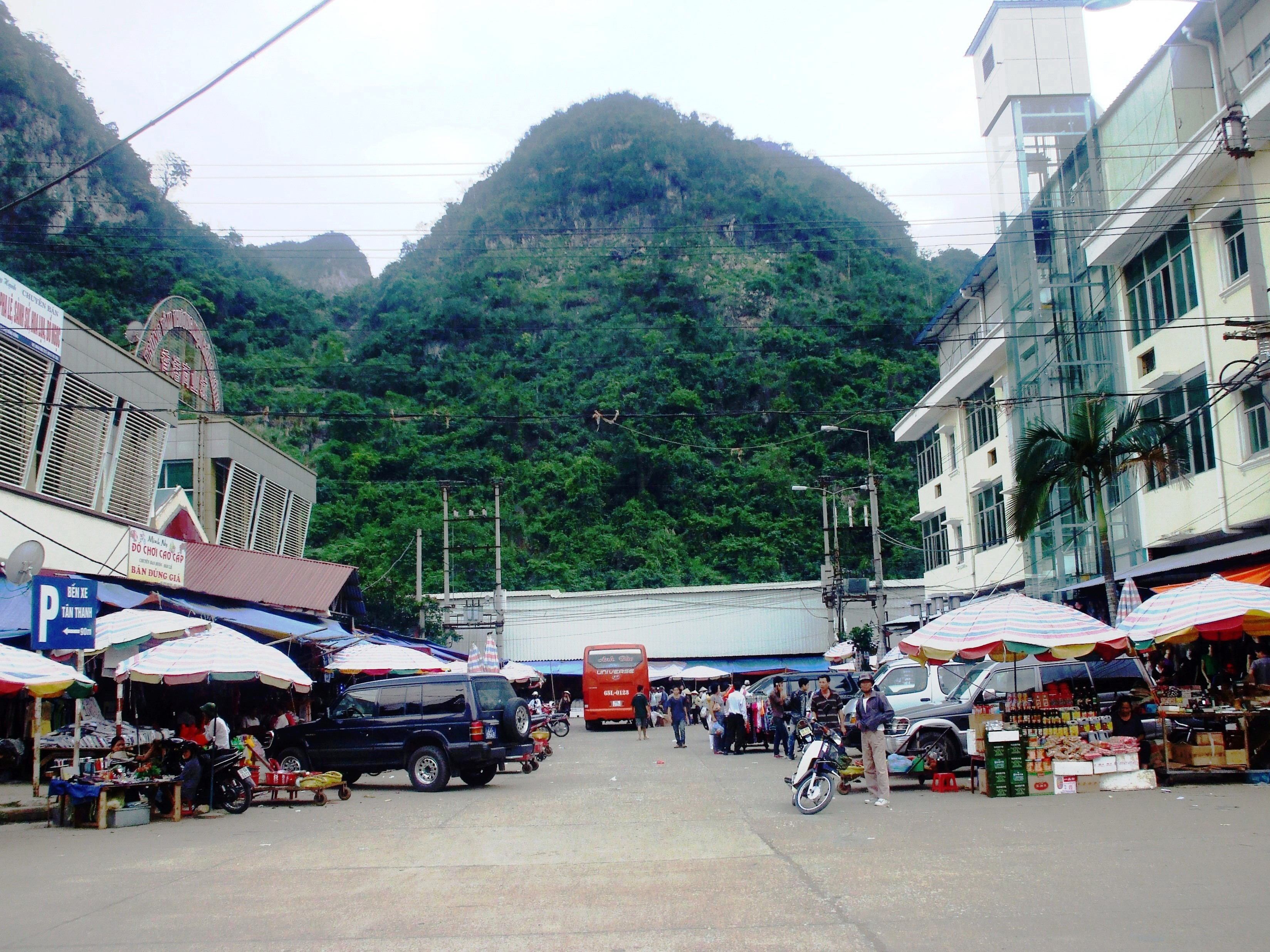 Chợ Tân Thanh thuộc huyện Văn Lãng, tỉnh Lạng Sơn (Việt Nam). Đây là một ngôi chợ ở khu vực biên giới phía Bắc, buôn bán đủ các thứ hàng hóa, nhất là các loại hàng hóa có nguồn gốc từ Trung Quốc.